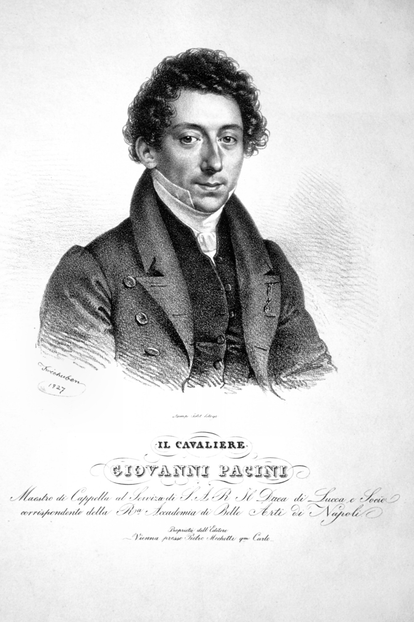 Giovanni Pacini (1796-1867), Lithographie von Josef Kriehuber, 1827 Portrait of the Italian composer Giovanni Pacini (1796 – 1867)